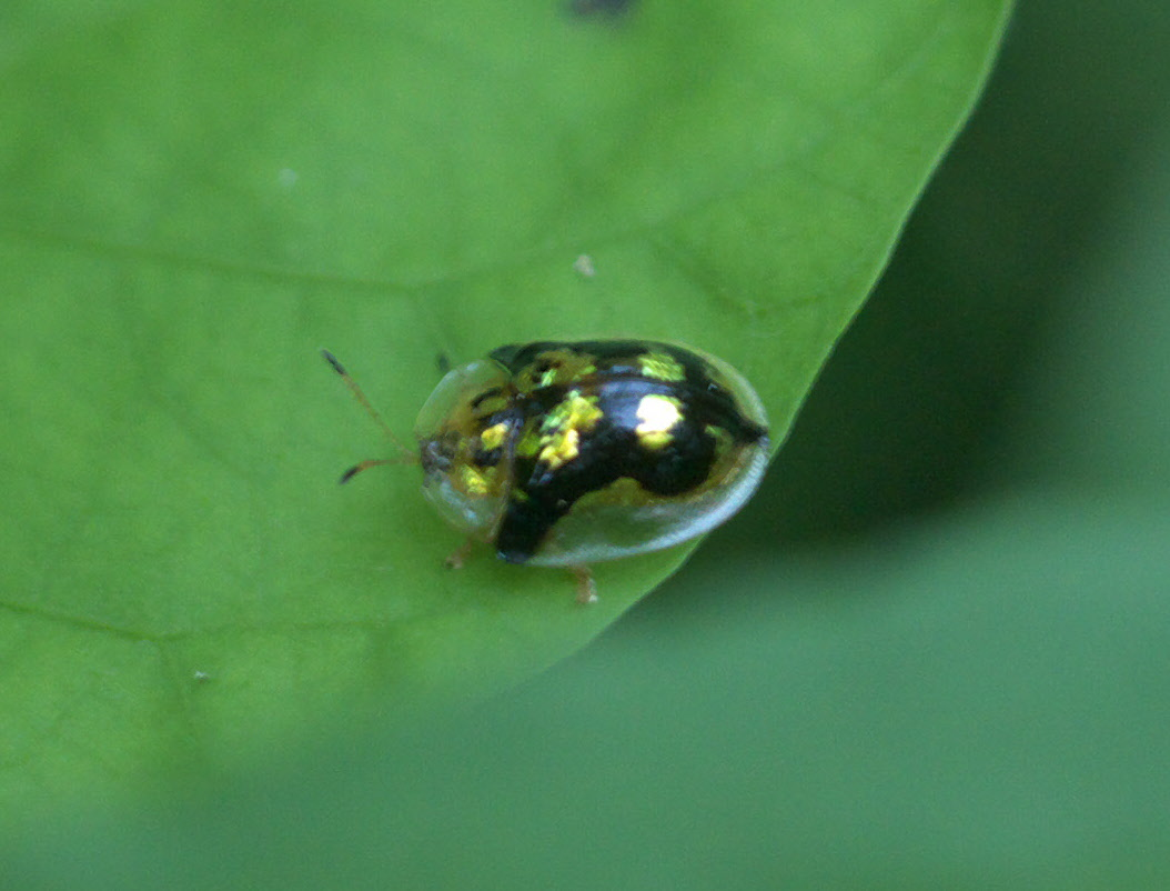 Deloyala guttata, Mottled Tortoise Beetle, ID Confidence: 87